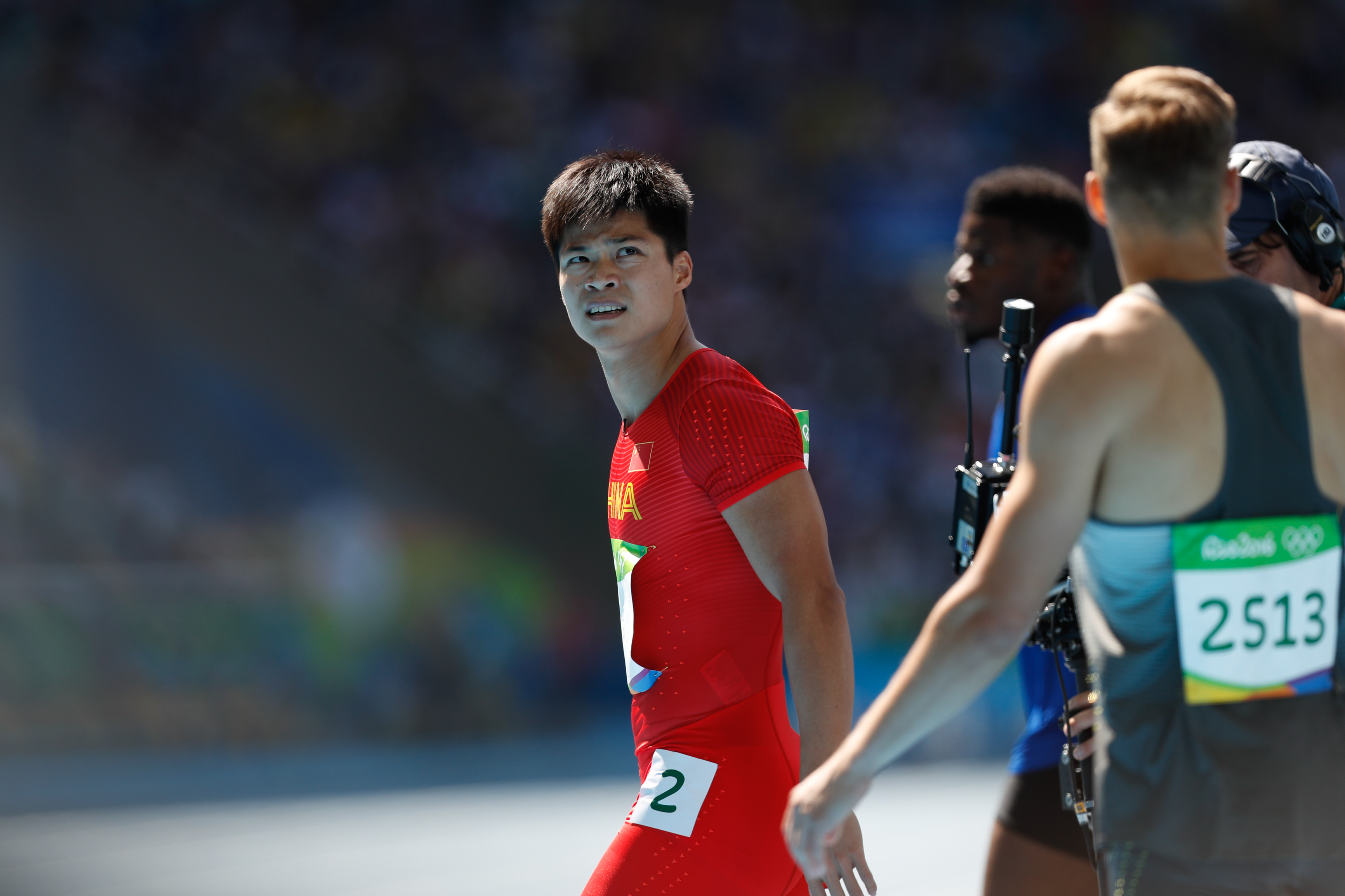 Men's 100 m sprint heats